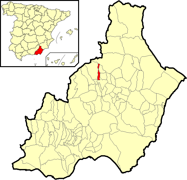 Situación del término municipal de Somontín respecto a la provincia de Almería, en España.